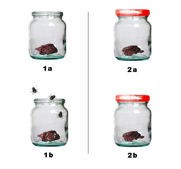 Esperimento condotto da Francesco Redi sull'abiogenesi (origine della vita).